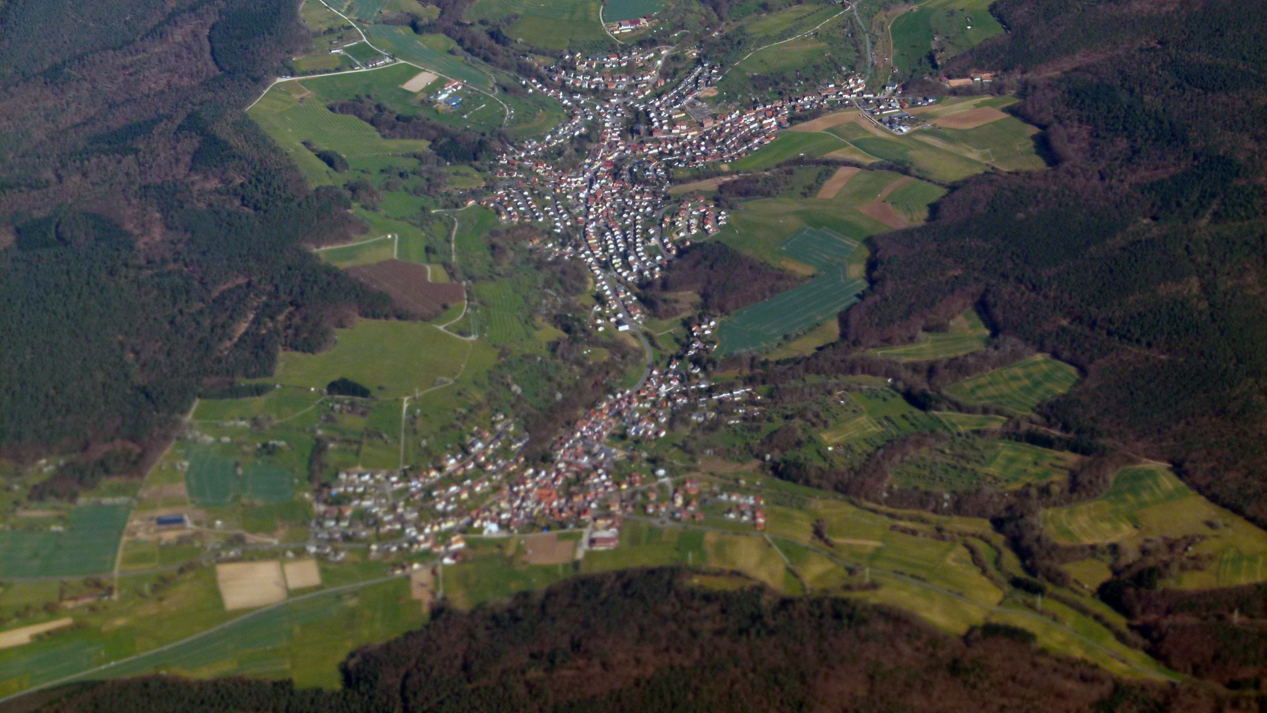 Luftbild von Hofstetten (Kleinwallstadt) (unten) und Hausen (Aschaffenburg) (oben)